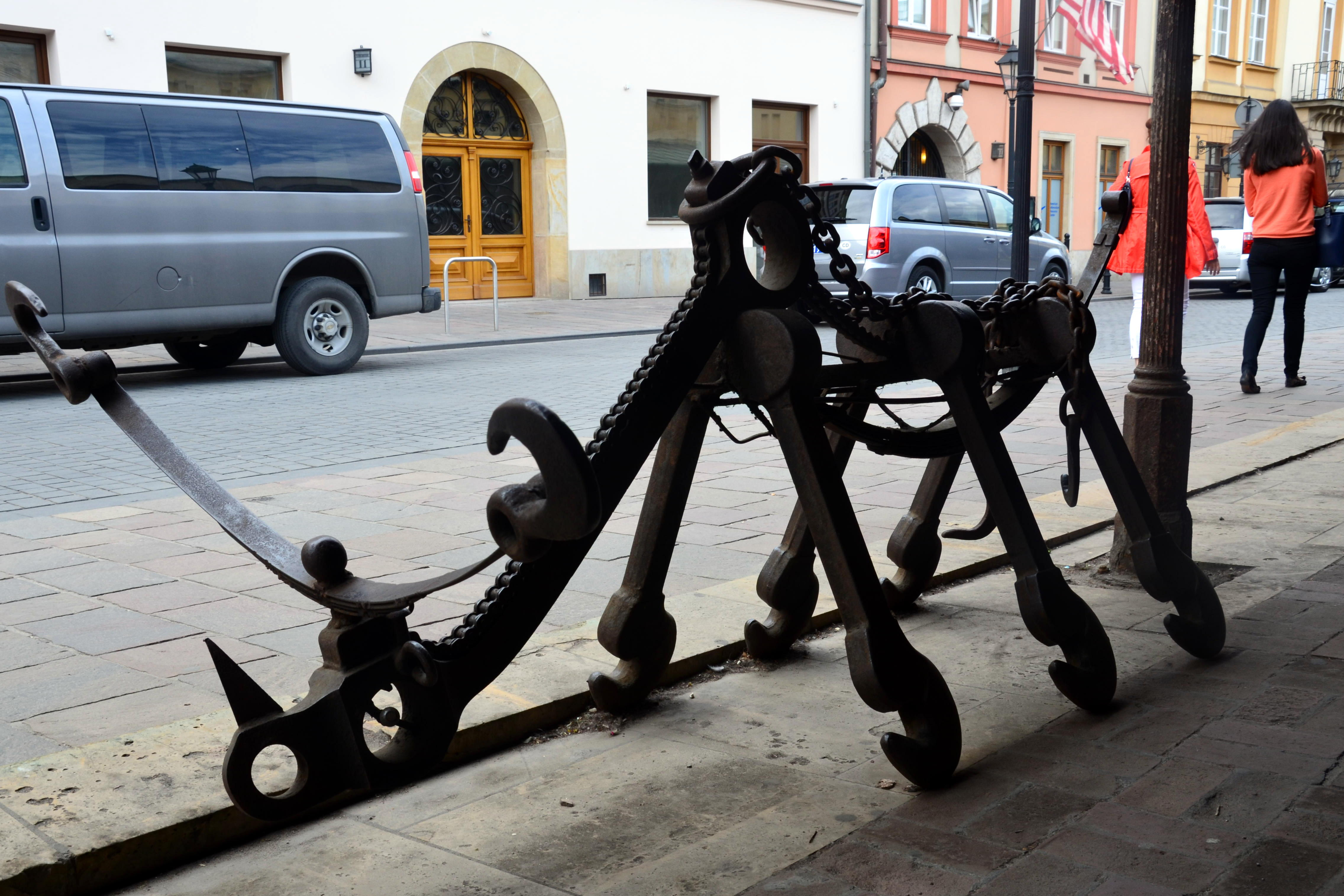 Krakau, Stolarska-Strasse "TĘPAK STĘPAK" von Mariana Kruczka